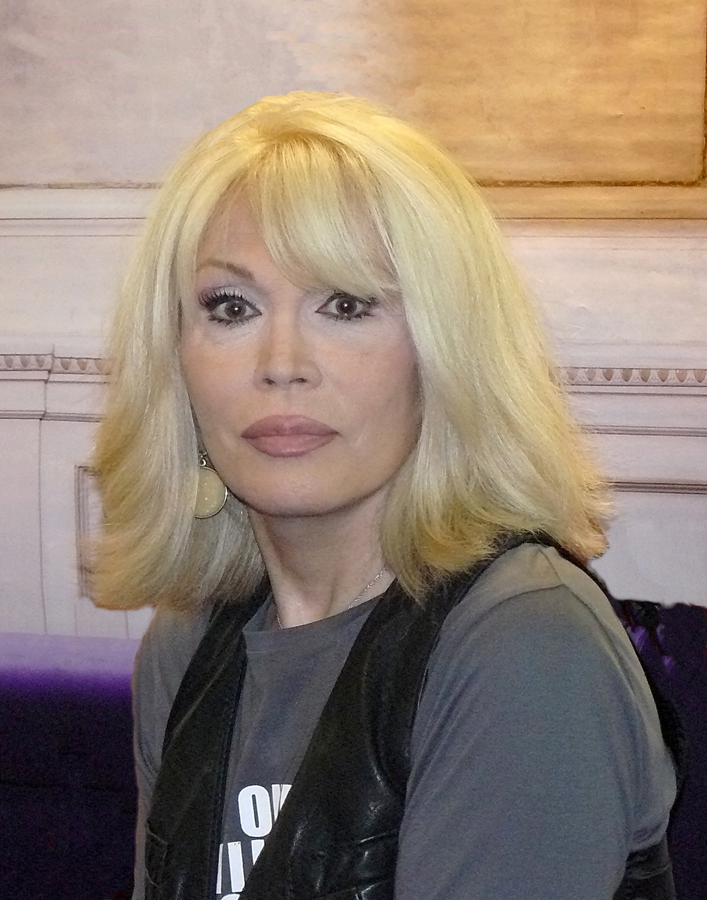 Amanda Lear, lors d'une signature à la FNAC Forum, Paris, le 5 février 2010